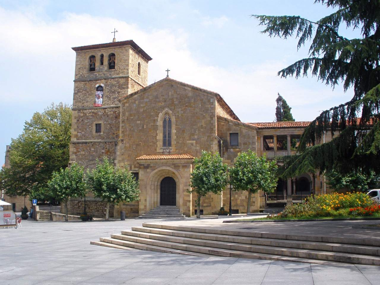 Aviles - Plaza de Domingo Acebal e iglesia de San Nicolás de Bari